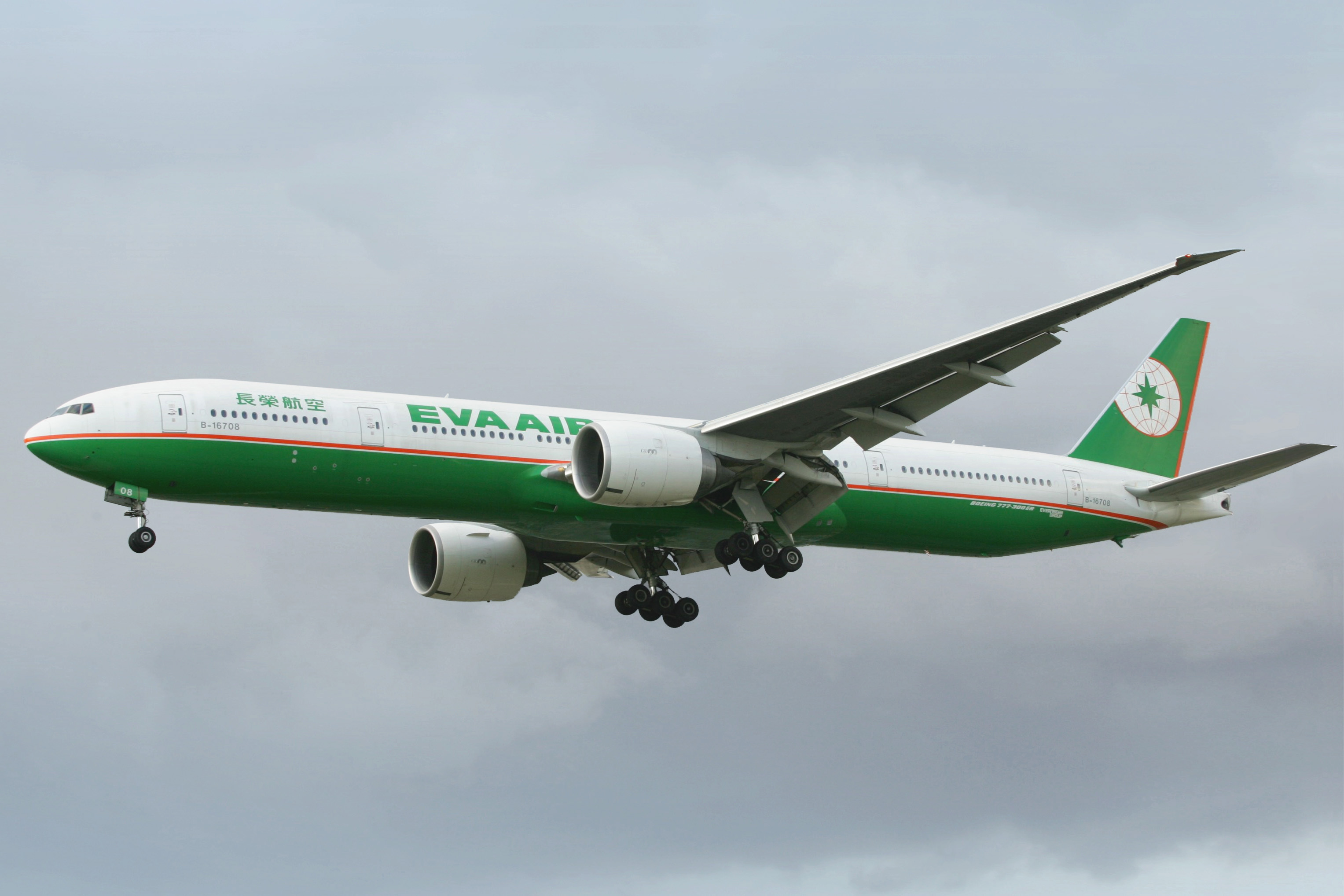 EVA Air B-16708 Boeing 777-300ER